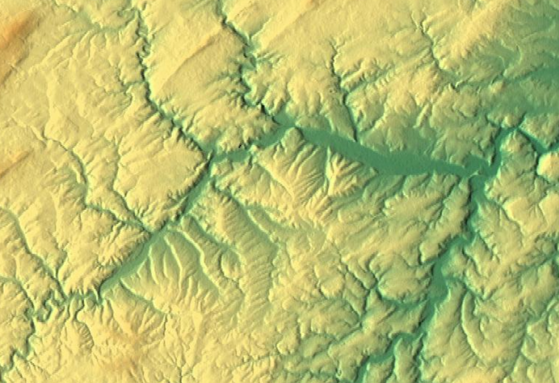 Relief der Sobernheimer Talweitung nördlich des Kirner Nahewinkels im Nordwesten des Nordpfälzer Berglands